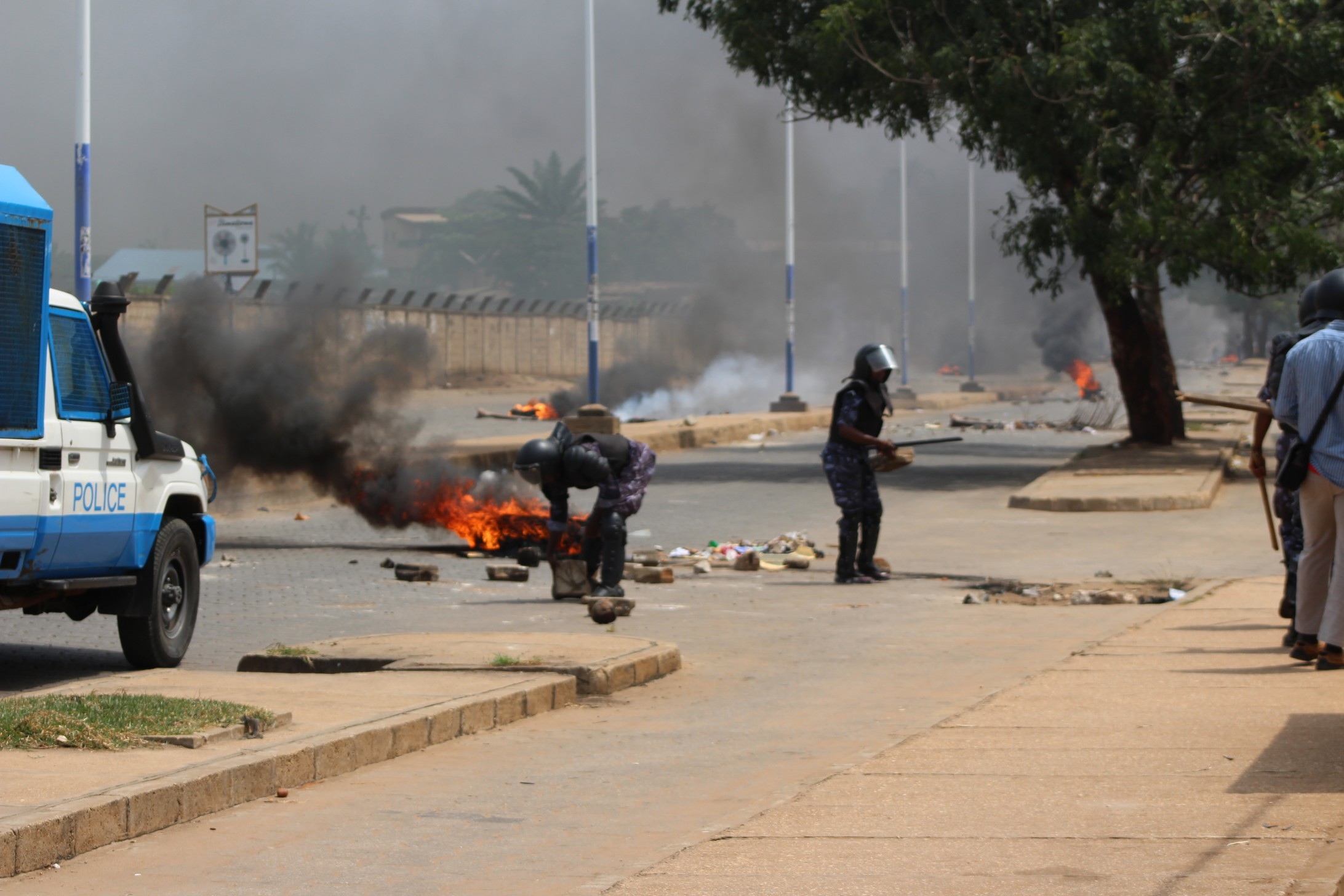 La police est intervenue contre les manifestations dans les rues de Lomé, au Togo, le 18 octobre 2017. (VOA/Kayi Lawson)